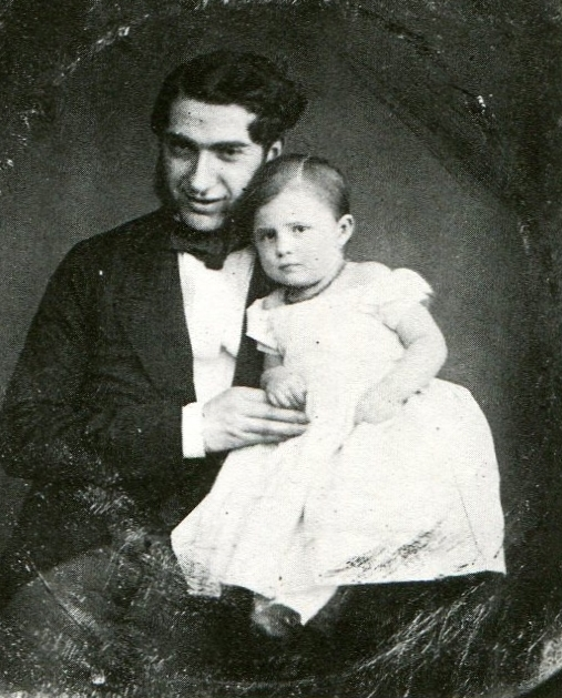 Porträt Senator Emil von Melle mit Sohn Werner, dem späteren Bürgermeister